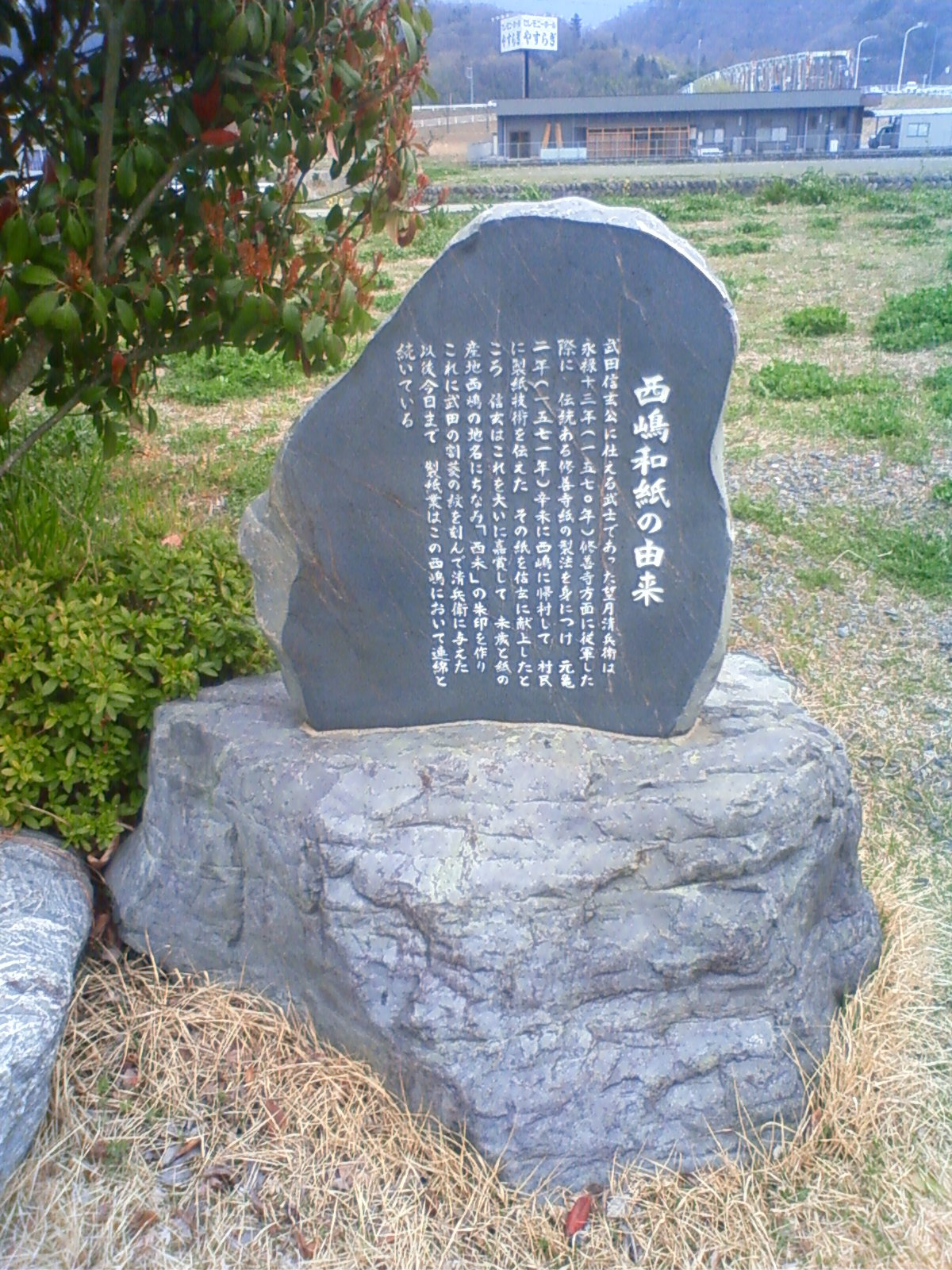 西嶋和紙の由来（山梨県身延町西嶋）。